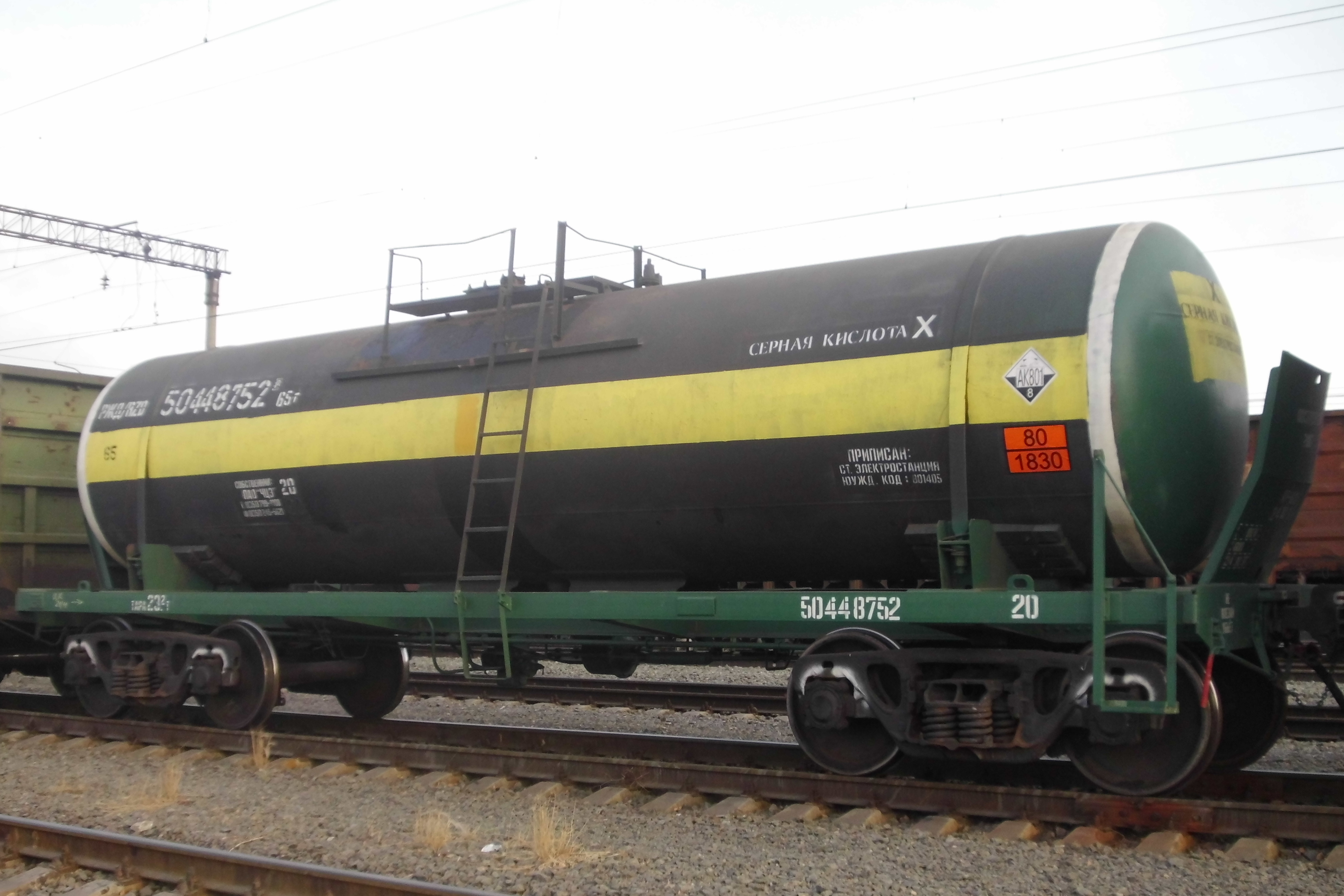 4-х осный вагон-цистерна для серной кислоты с бронелистом. Россия.